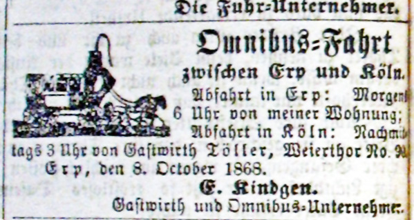 Personenbeförderung im 19. Jahrhundert. Von Erp, Lechenich, Hürth, zur Endstation Weyertor am Haus Töller in Köln, und zurück